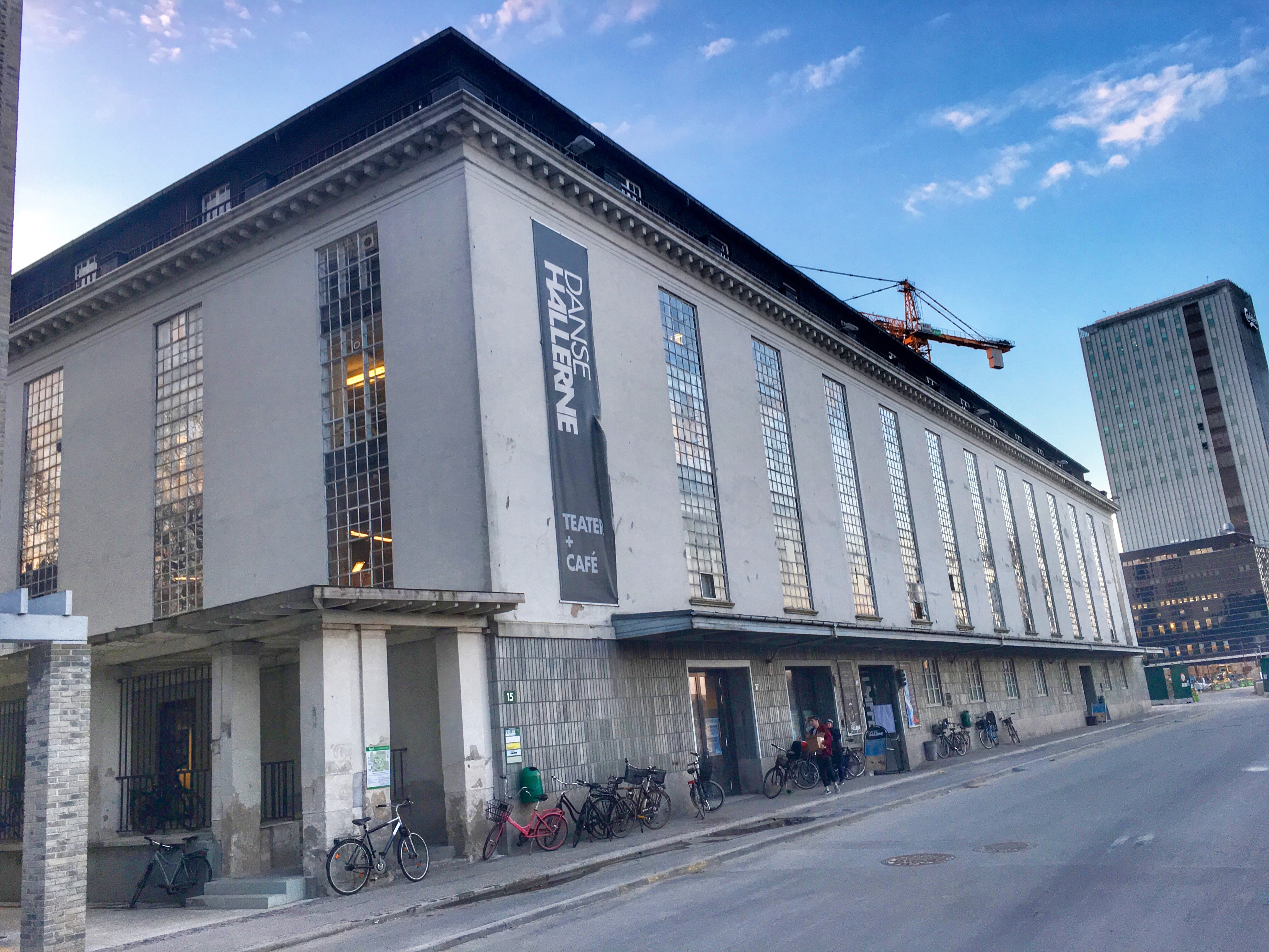 Dansehallerne, Bohrsgade, Vesterbro